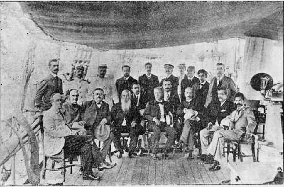 participantes del tratado de paz del Marblehead en 1906. La Locomotora, 28 de julio de 1906.